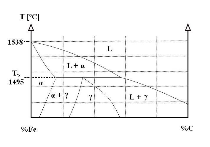 Przemiana perytektyczna w układzie podwójnym Fe-C